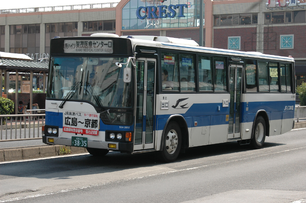 呉駅前にて撮影